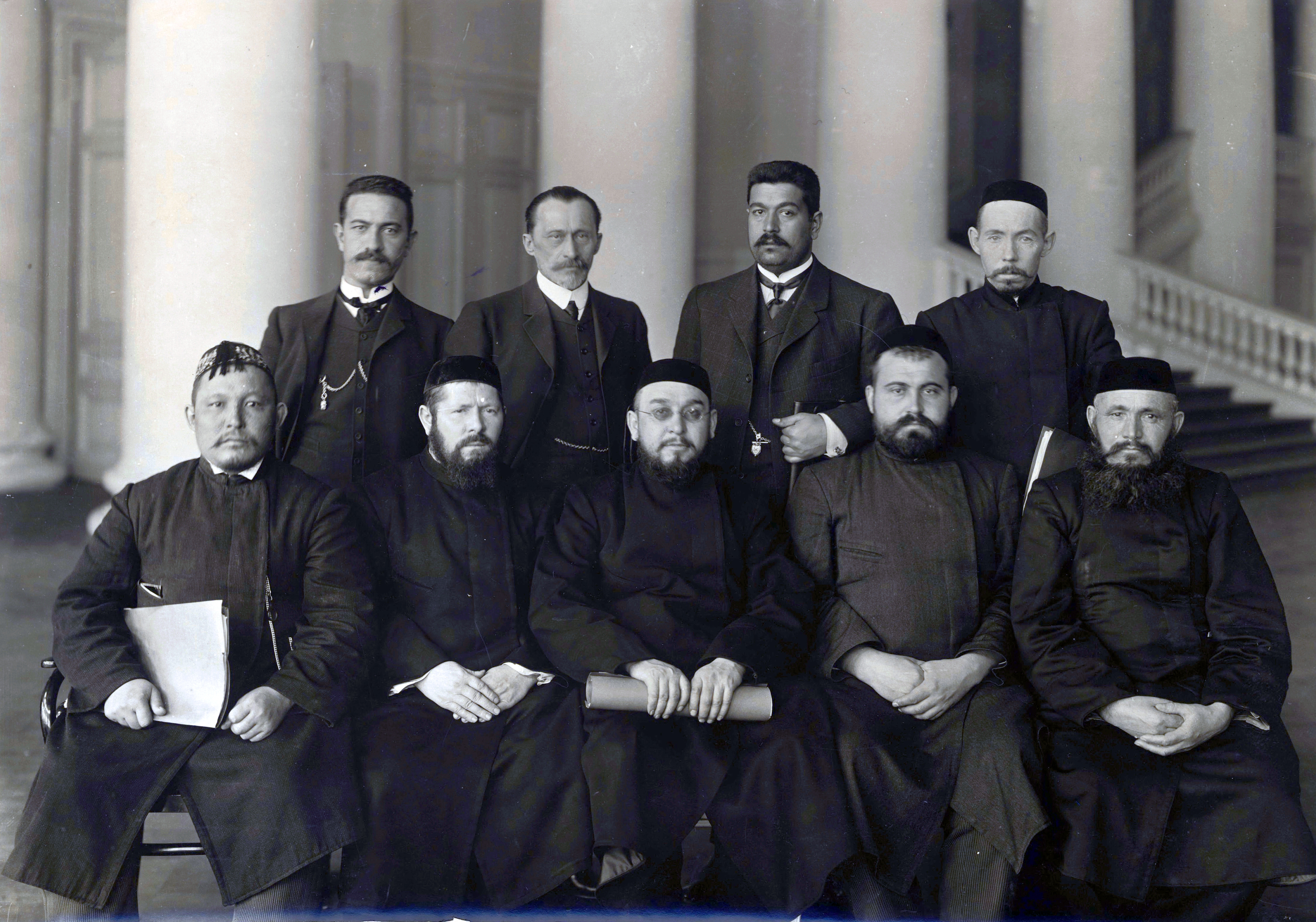 Группа депутатов II Государственной Думы Российской империи. Стоят слева направо: 1. Махмудов Мустафа-Гаджи-Муса-Оглы. 2. Тевкелев Кутлу-Мухамед Батыргареевич. 3. Зейналов Зейнал-Эйнал-Оглы. 4. Бадамшин Гариф Серазетдинович Сидят слева направо: 1. Кощегулов Шаймардан. 2. Хасанов Мухамед-Сабир (нет в Википедии) 3. Усманов Хайрулла Абдурахманович 4. Атласов Гадый Мифтахутдинович. 5. Мусин Гумер Мусич